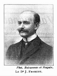 Le Dr J. Froment - Paris médical : la semaine du clinicien, 1913, n° 12, p. 507